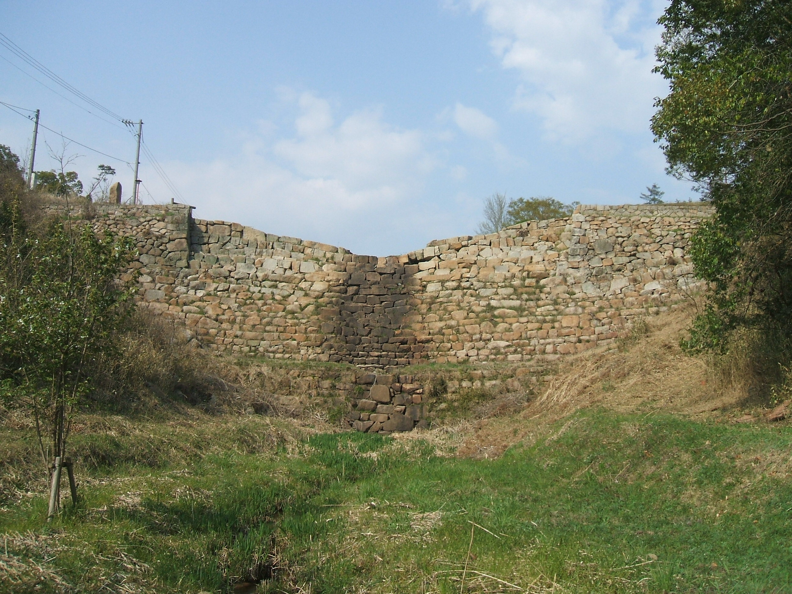 広島県福山市神辺町にある日本式砂防ダムである砂留、第六堂々川砂留